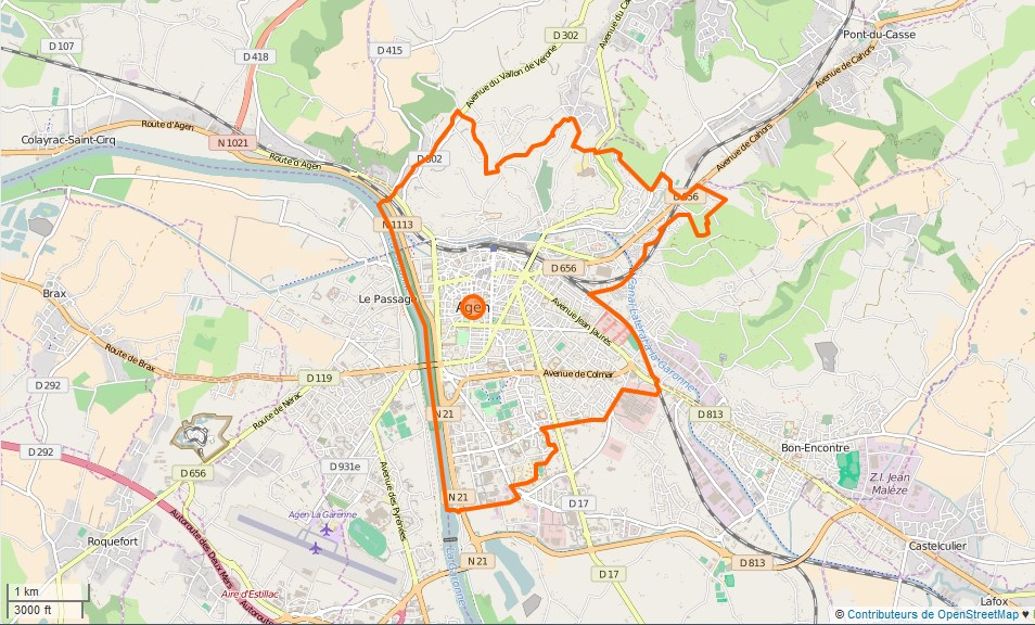 Agen Limite communale This map may be incomplete, and may contain errors. Don't rely solely on it for navigation.